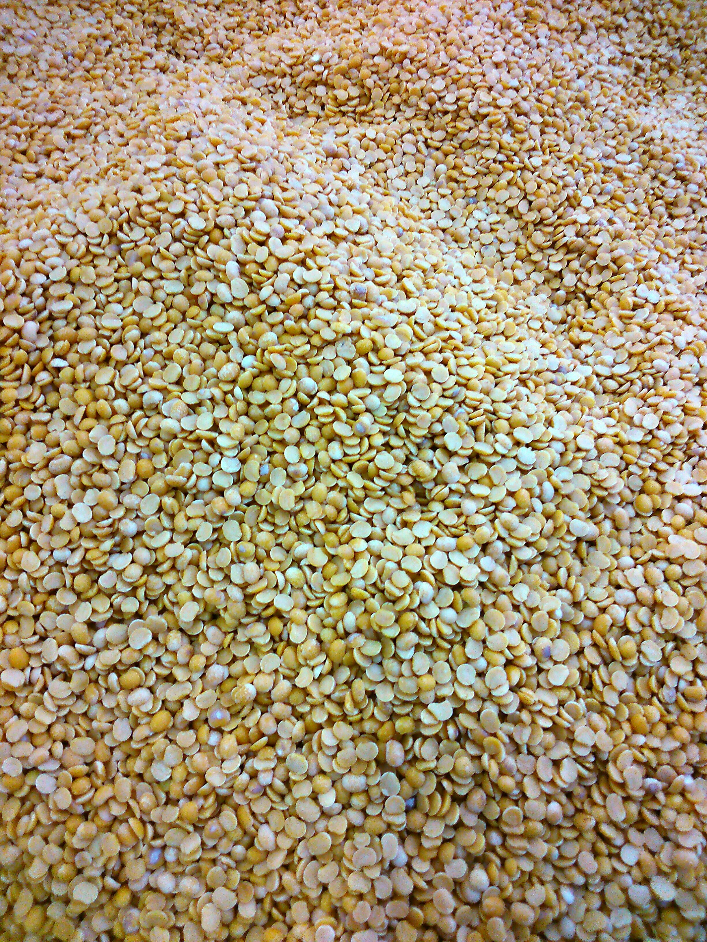 Halbierte Straucherbsen (Toor Dal) im Spar Hypermarket Bangalore, Indien.